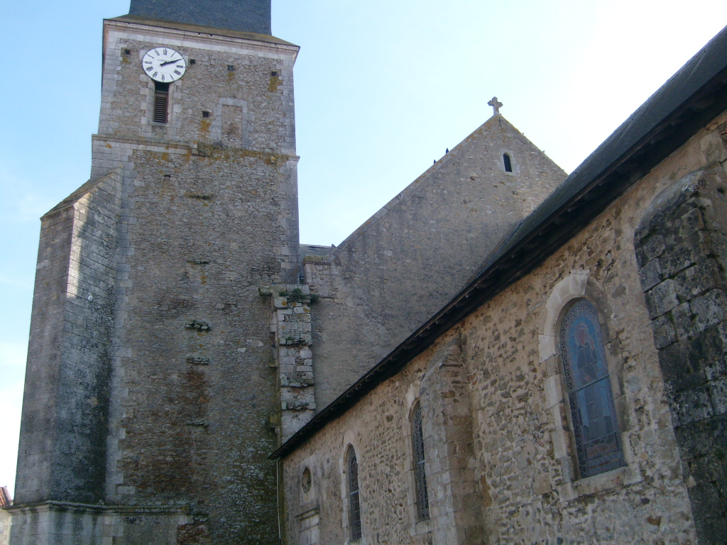 Vue du clocher et de la partie romane de l'église Notre-Dame d'Olonne-sur-mer.